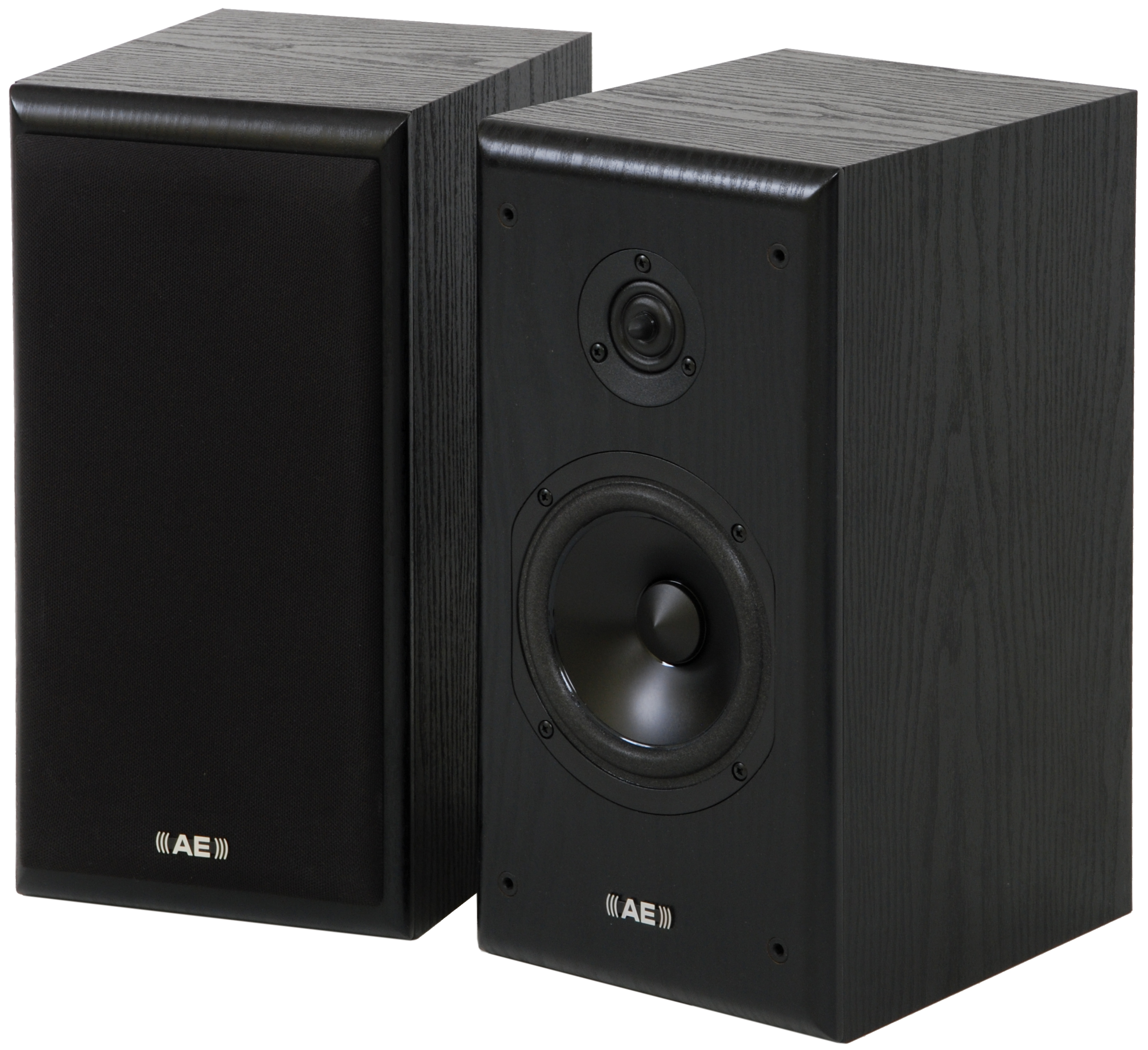 Głośniki podstawkowe Aegis Neo 1 firmy Acoustic Energy